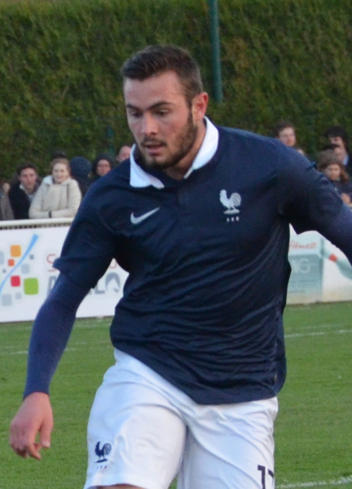 Photographie prise lors du match opposant la France à l'Angleterre pour les qualifications du championnat d'Europe de football des moins de 19 ans 2015 au stade Louis-Villemer de Saint-Lô le 31 mars 2015. Ici, Lucas Tousart.